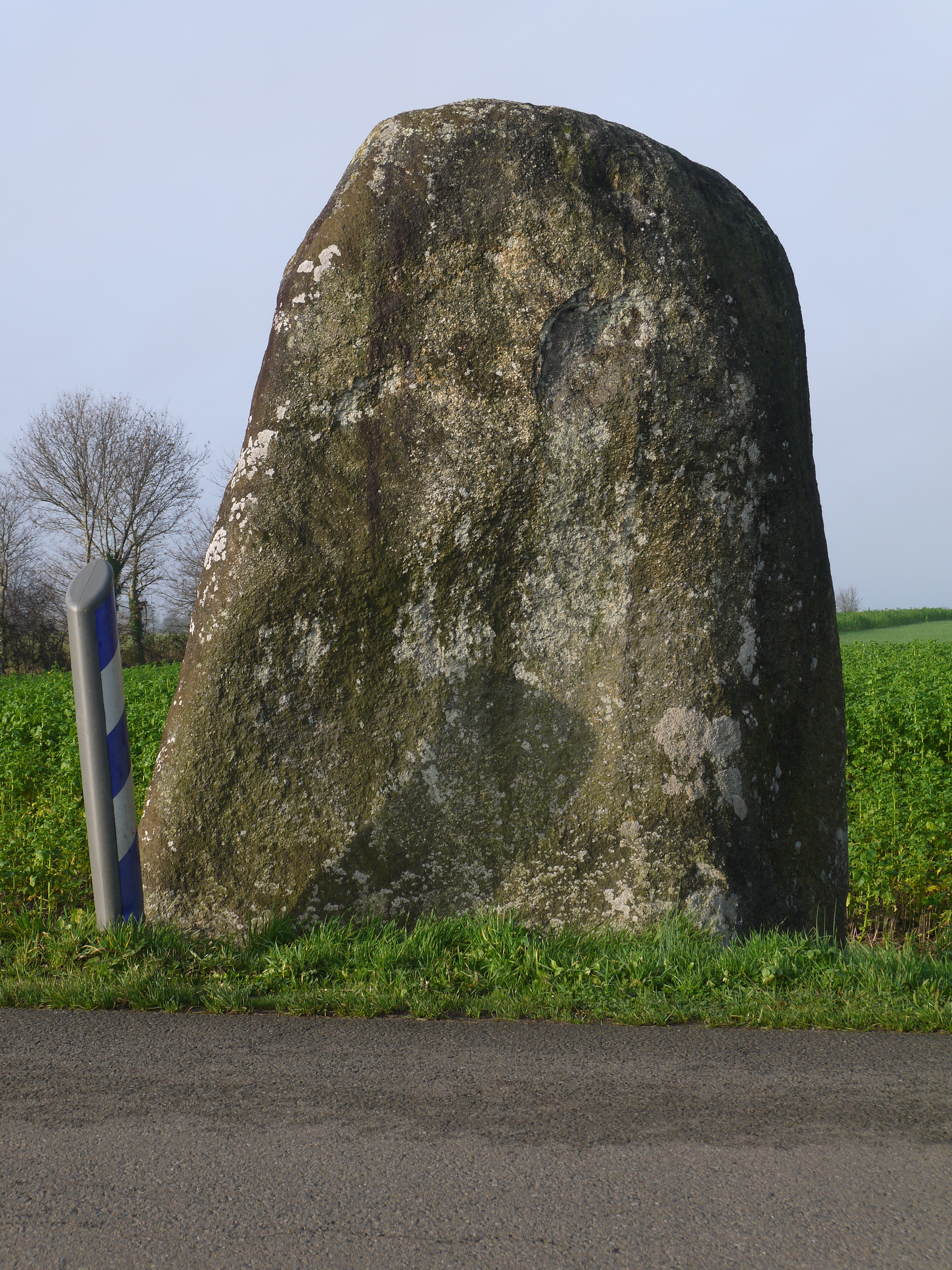 Le menhir.